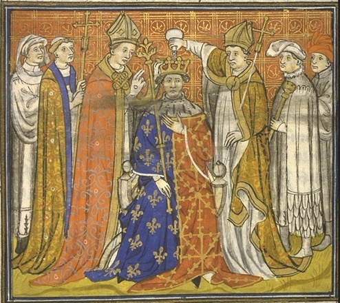 Philippe V